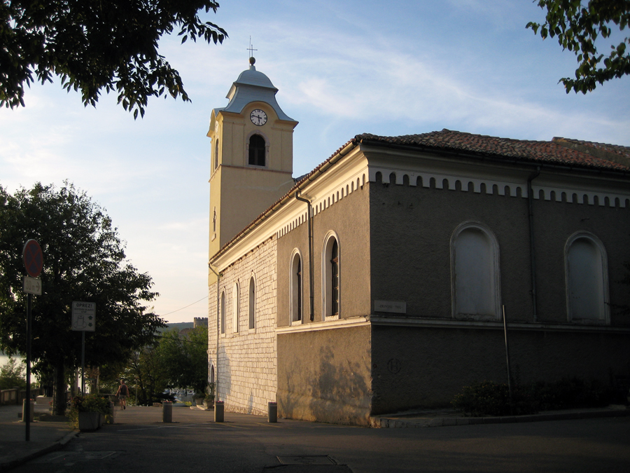 Kraljevica